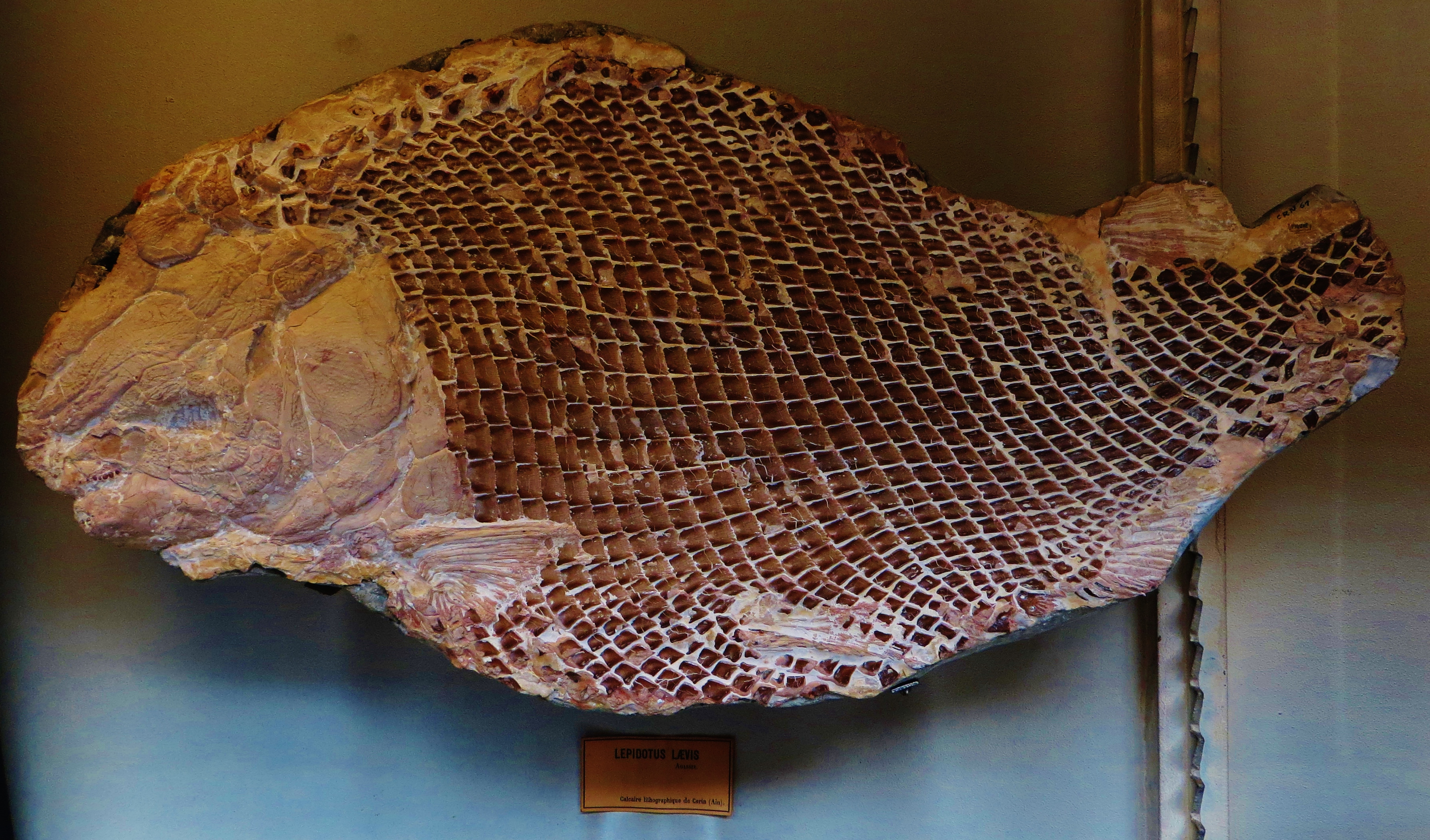 Fossil of Lepidotes, an extinct fish- Took the photo at Musee d'Histoire Naturelle, Paris